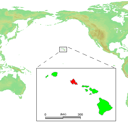 Hawaii Islands - Oahu.PNG